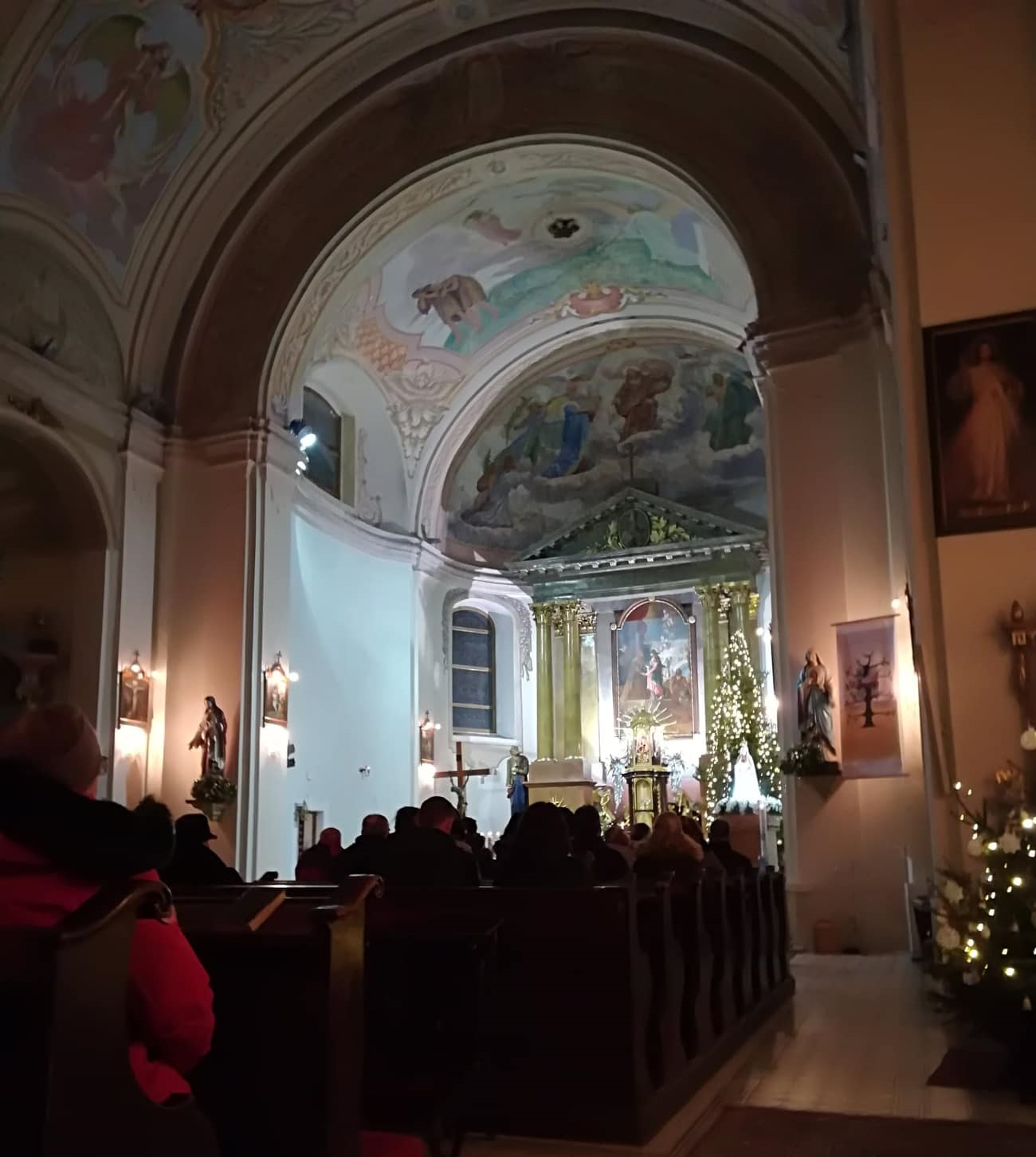 Interiér kostola vo Višňovom